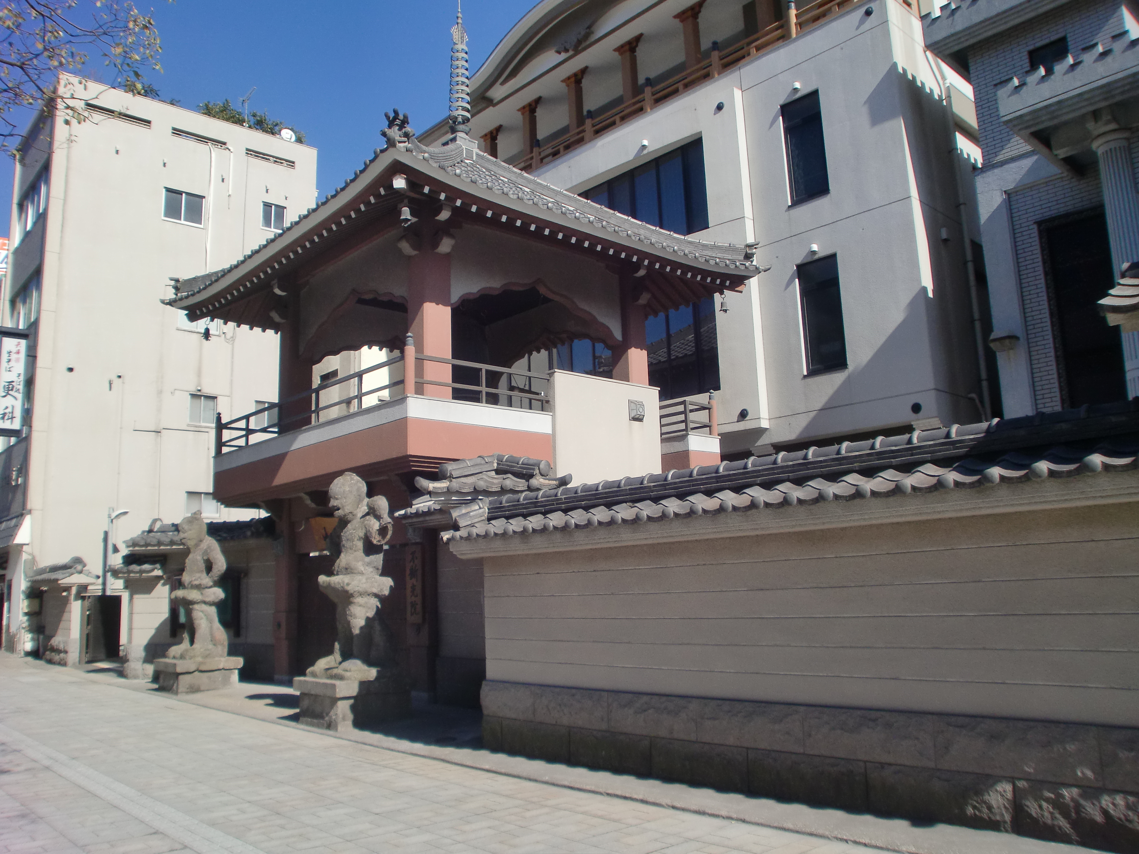 鹿児島県鹿児島市にある不断光院の外観。